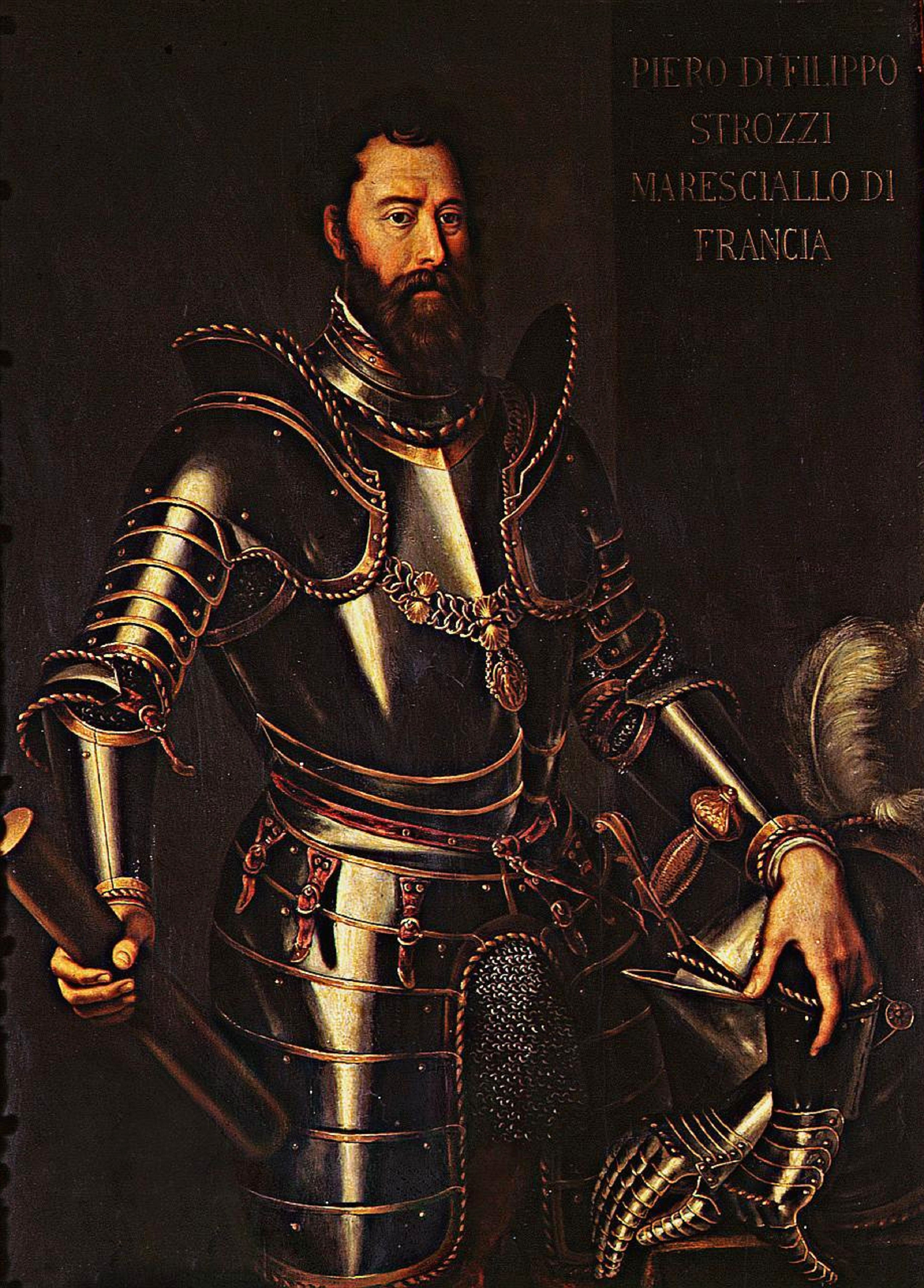 Piero Strozzi (* 1510, † 1558), Marschall von Frankreich. Porträt im Palazzo Vecchio, Florenz.